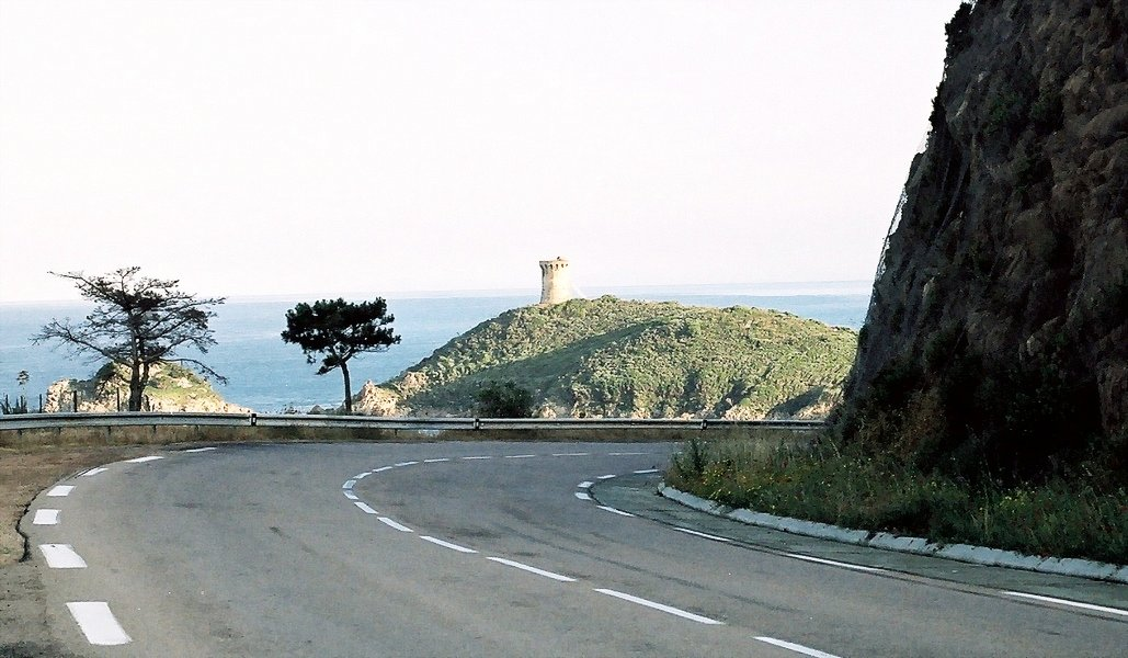 La tour gênoise de Fautea vue de la route nationale 198, entre Porto-Vecchio et Solenzara